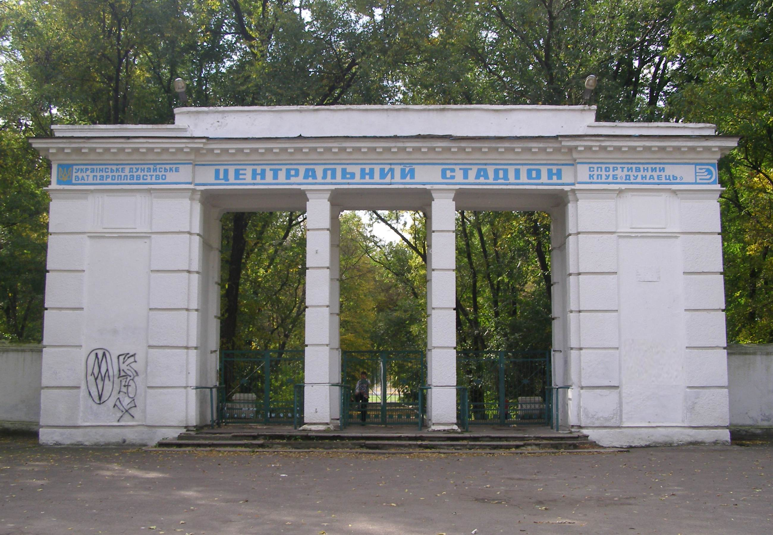 Der Eingang zum UDP-Zentralstadion (Ismajil)